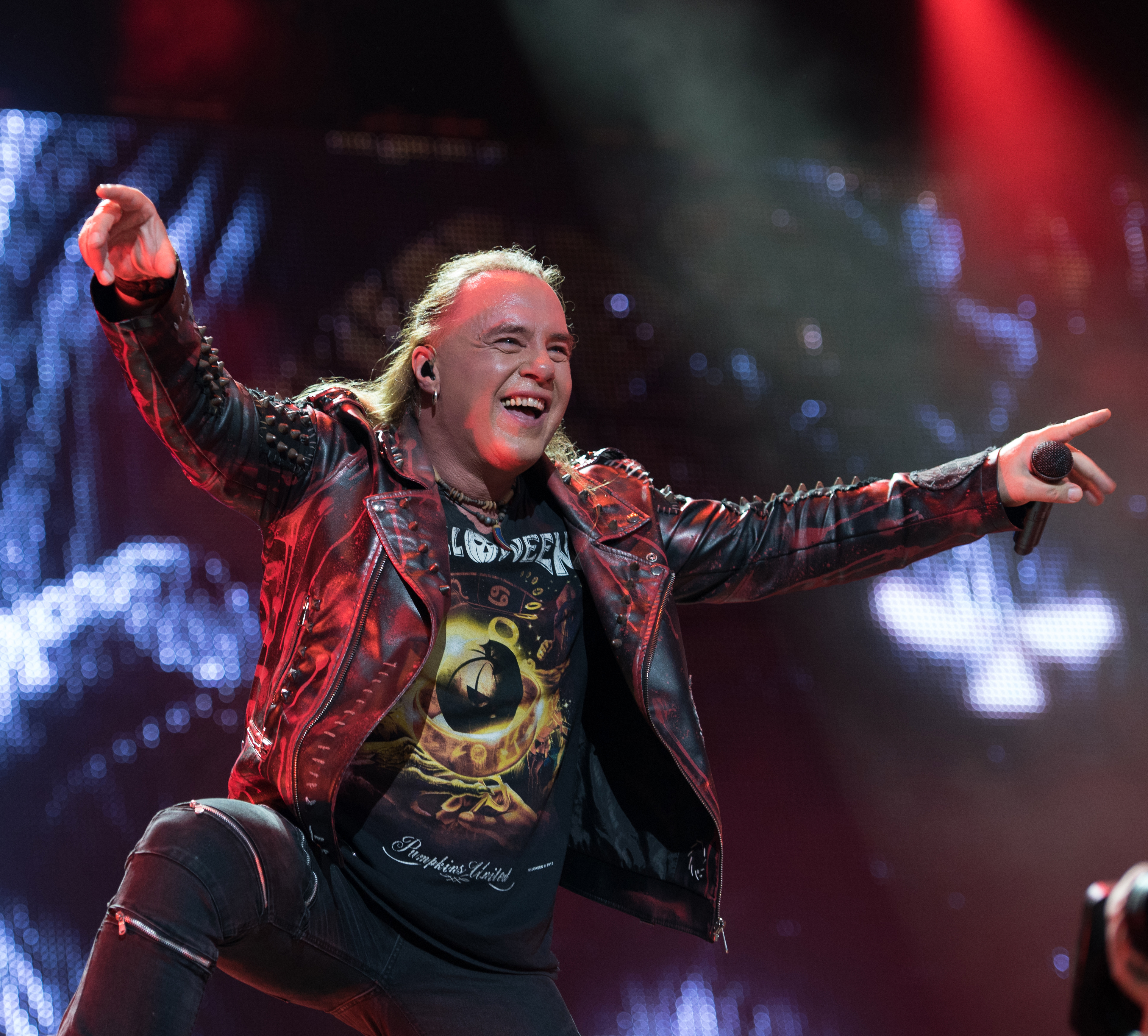 Helloween - Pumpkins United beim Wacken Open Air 2018